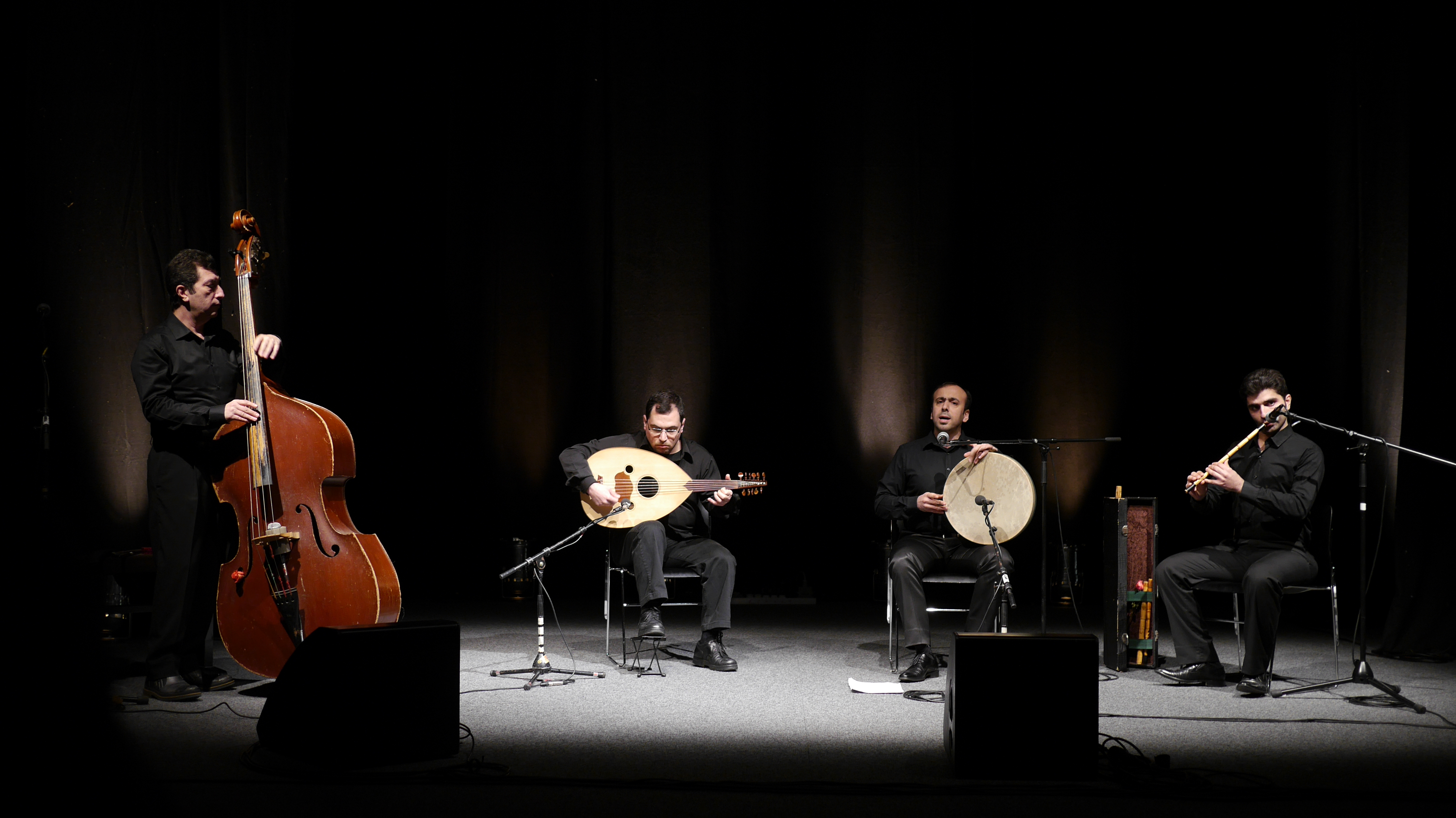 Ensemble Ramel Aleppo (Syrien) am 23.01.2015 beim Klangkosmos Weltmusik im Hangar 21 in Detmold.